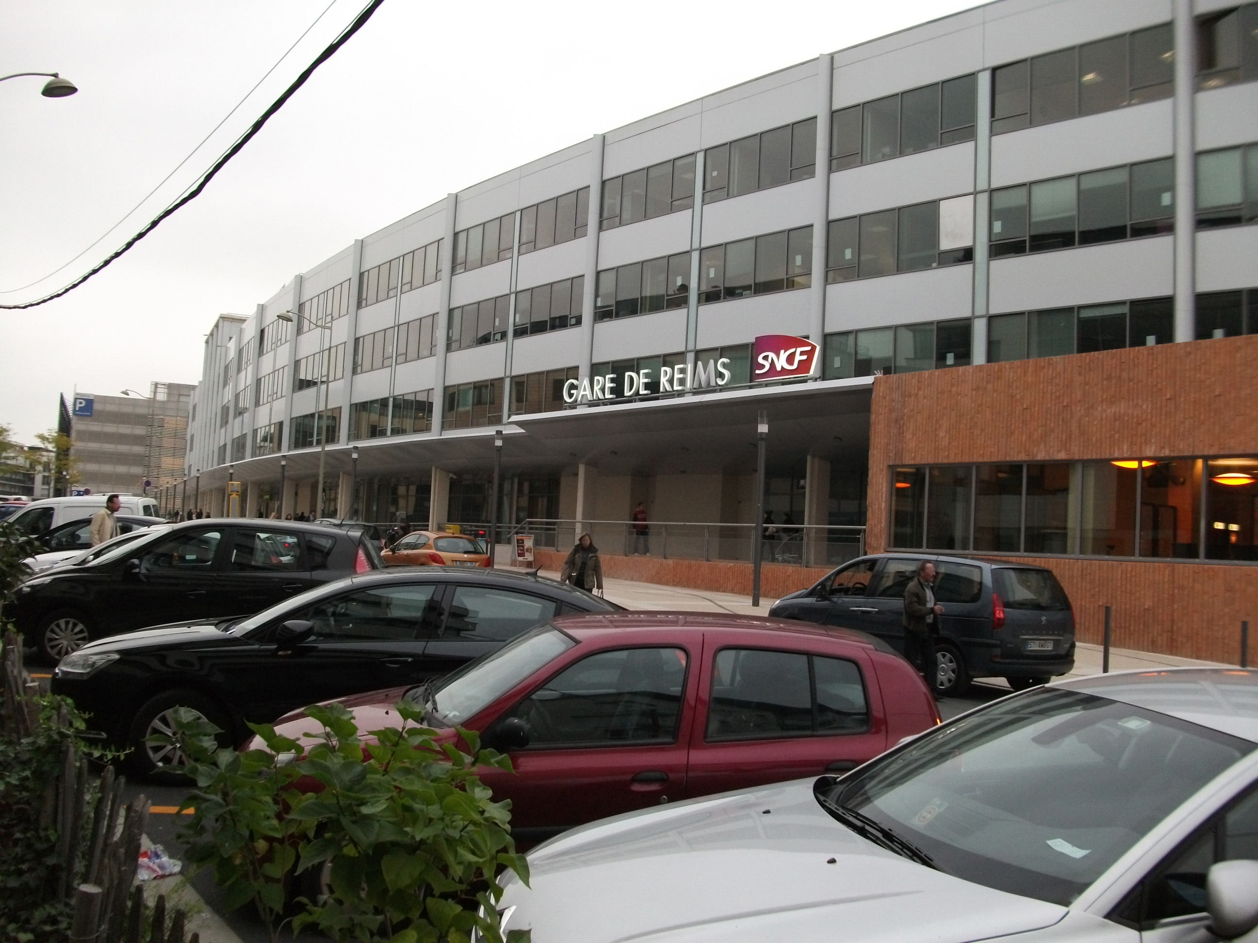 la rue E.Mignot de Reims, et une vue de la Gare avec sa sortie Clairmarais modifiée.